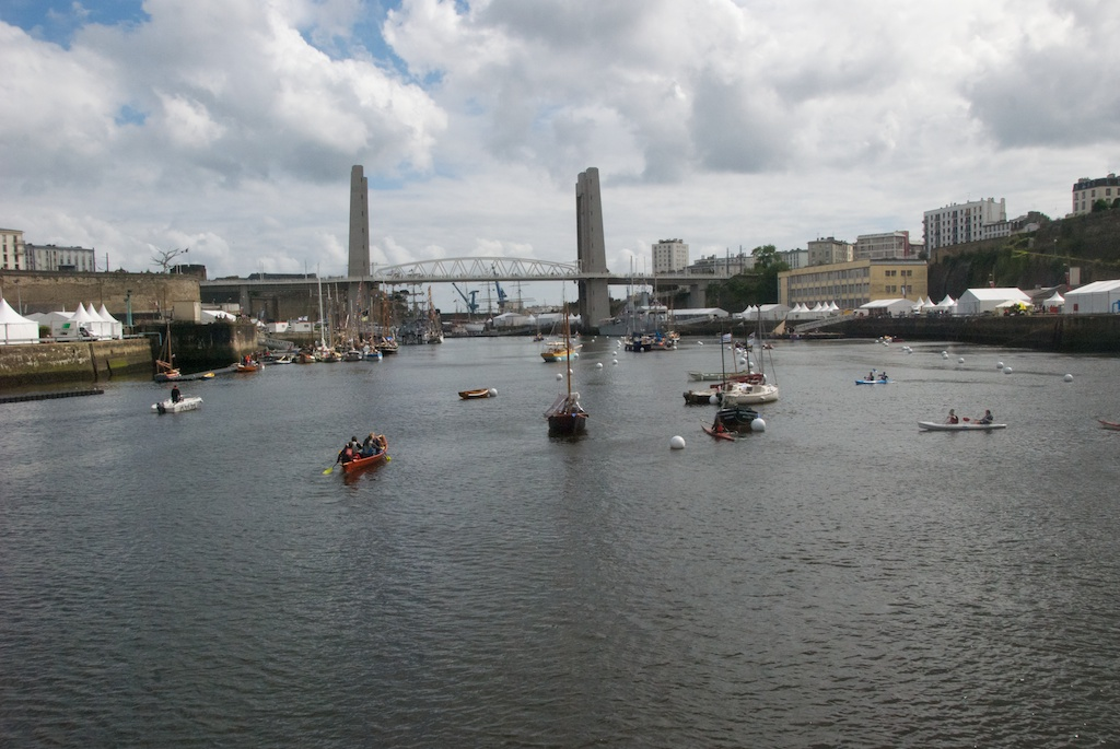 Tonnerres de Brest 2012 : Photo prise depuis le pont au fond de Penfeld montrant principalement le pont de recouvrance à Brest.